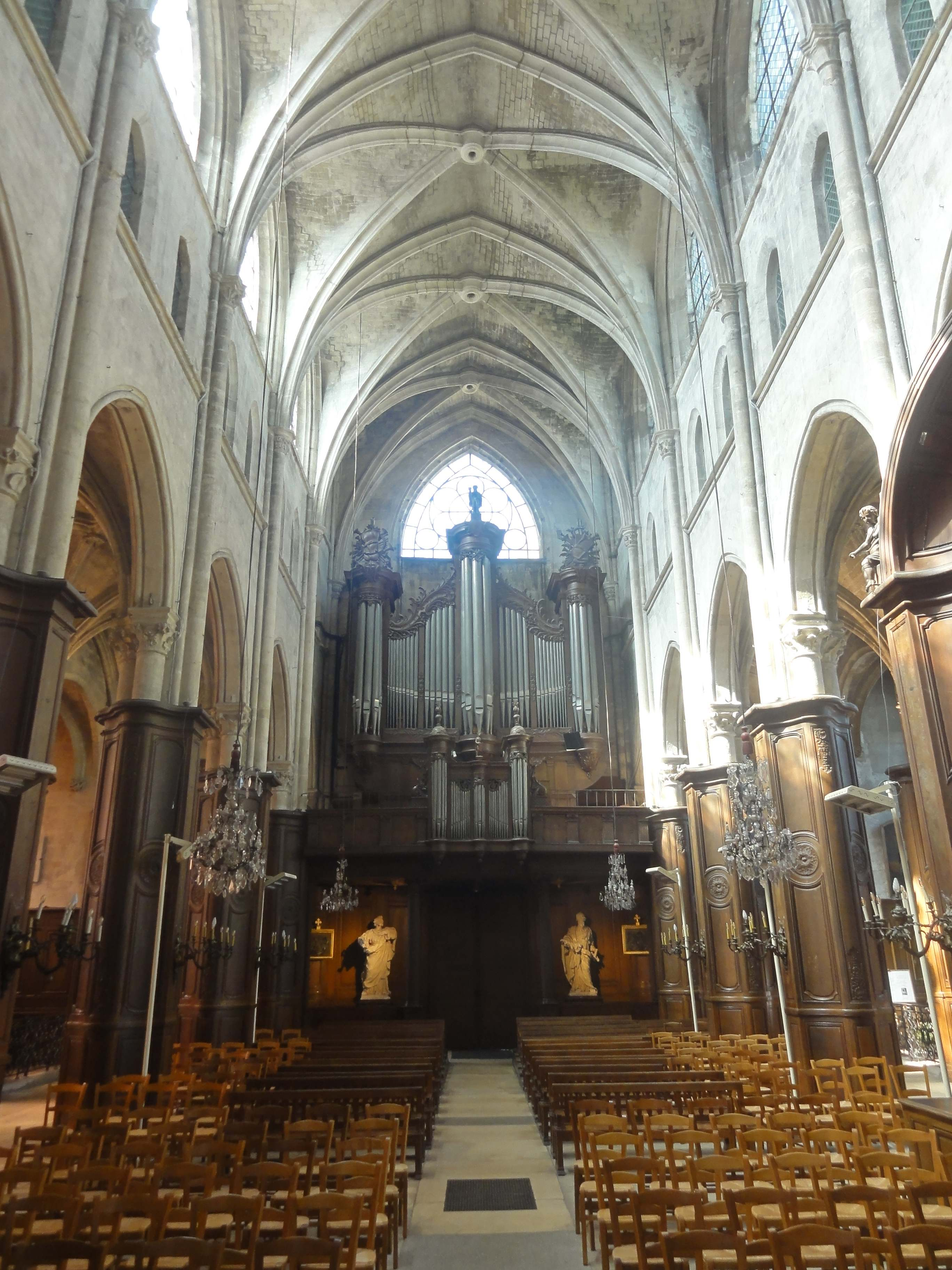 Nef de l'église - voir le titre du fichier.